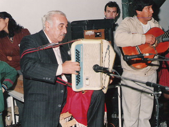 Ruben Miño en una actuación